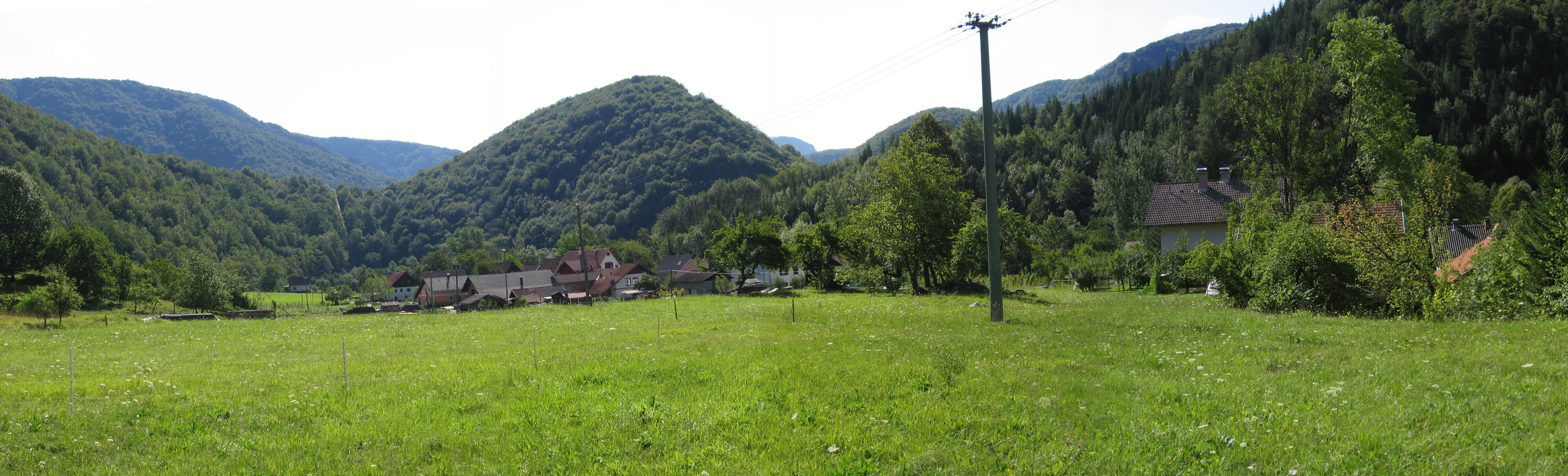 Slika Bosljive Loke, pogled proti vzhodu